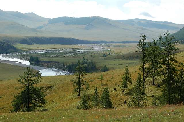 Гунын-Гол и Мунгарагийн-Гол сливаясь образуют Шишгид-Гол, он же малый Енисей